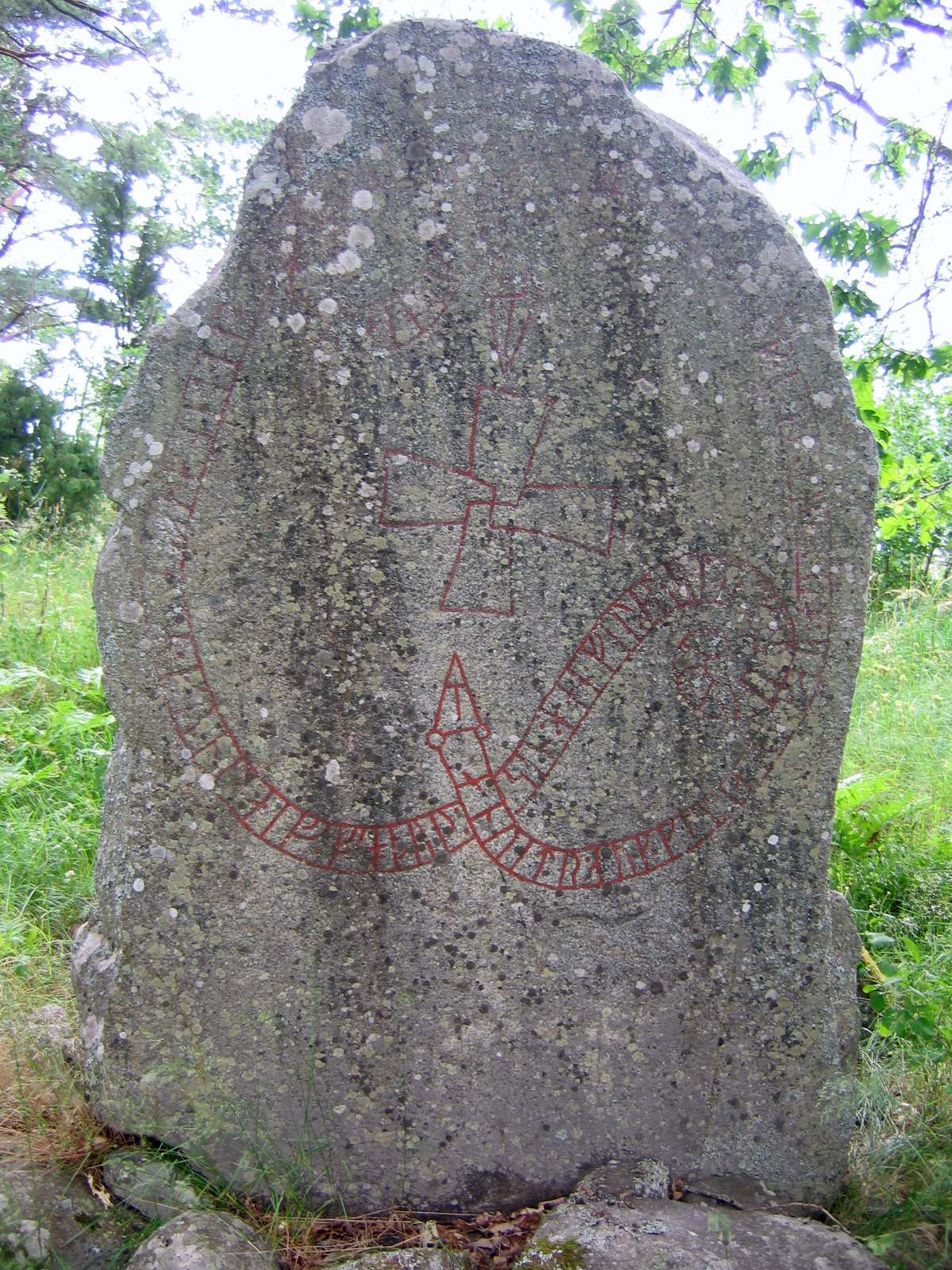 Runestone